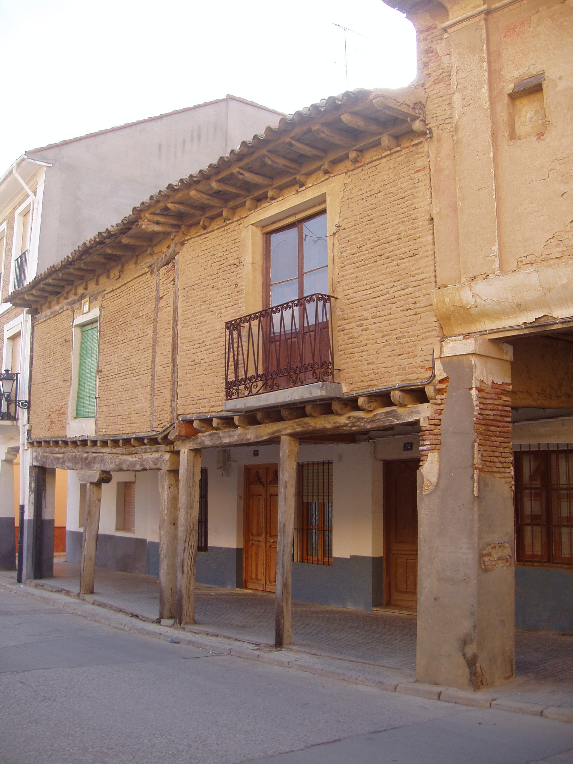 Casas de ladrillo sobre soportales (en este caso de postes de madera con jabalcones). Las calles asoportaledas son tradicionales en las villas de Castilla y León. Villalón de Campos (Tierra de Campos), provincia de Valladolid, España.